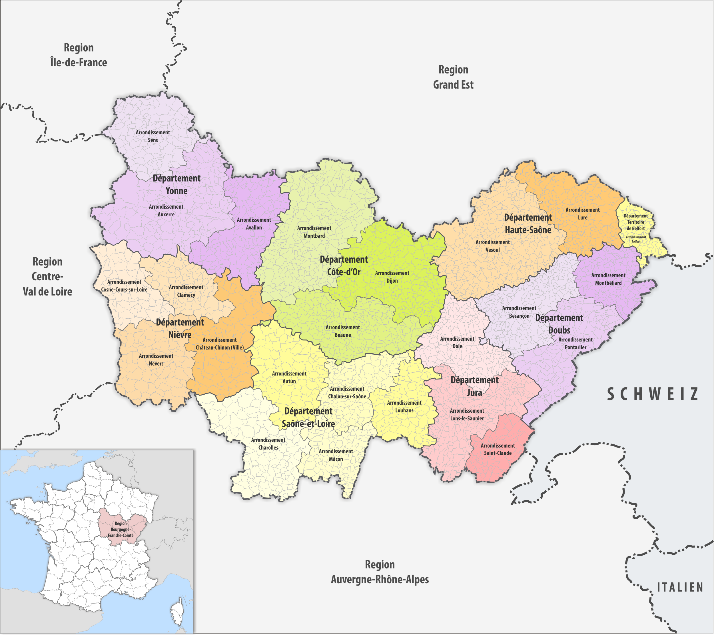 Gemeinden, Arrondissemente und Departemente in der Region Bourgogne-Franche-Comté